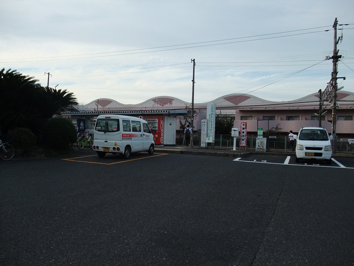 宇野線八浜駅